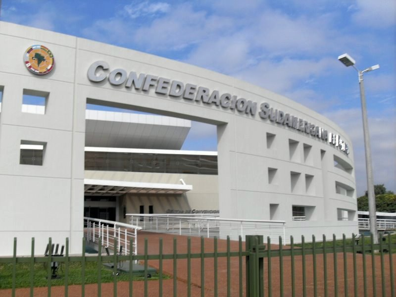 Fachada principal del centro de convenciones de la Conmebol, ubicado en la ciudad de Luque, Paraguay.